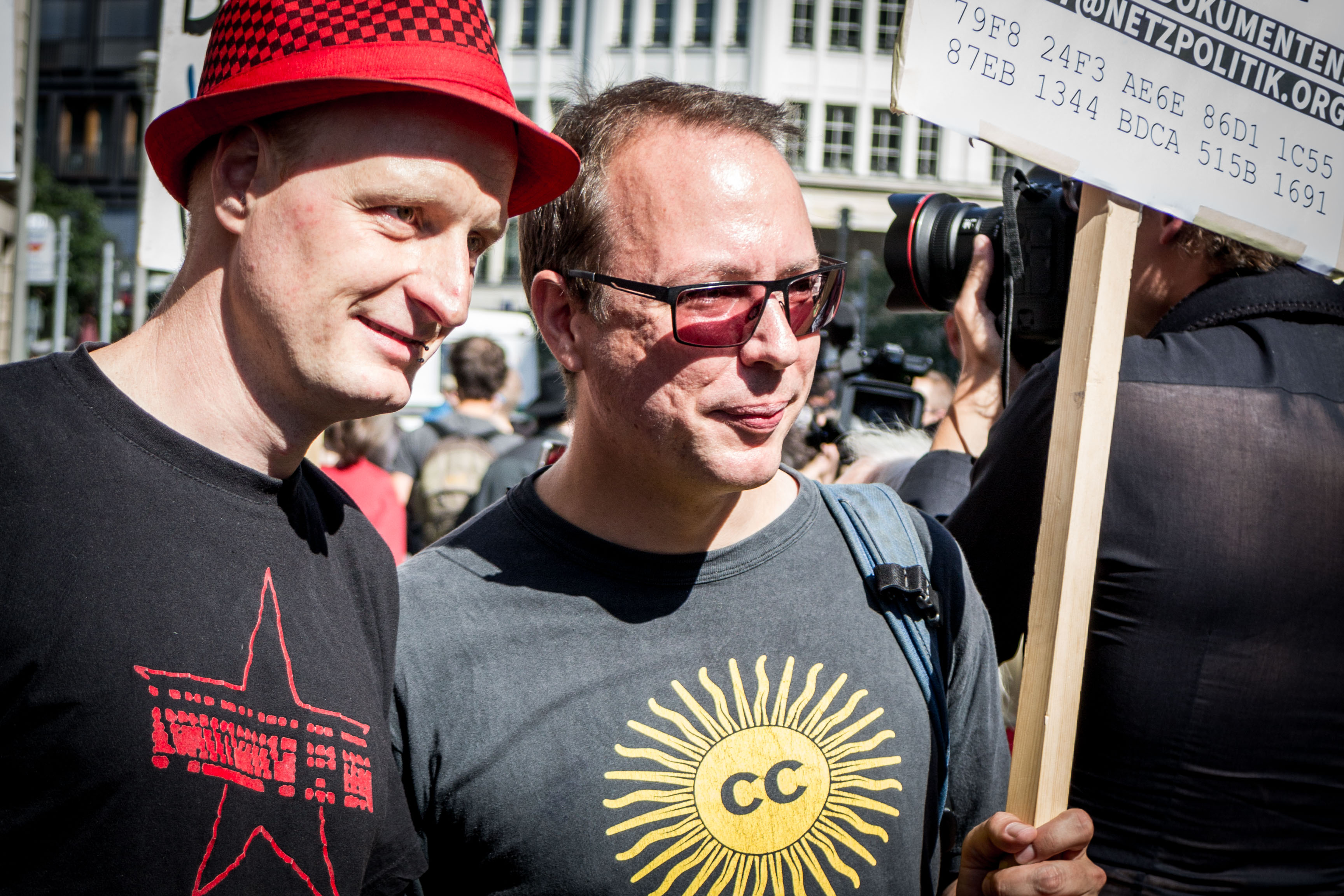 AutorenAndre Meister und Markus Beckedahl